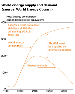 graf af orkunotkun